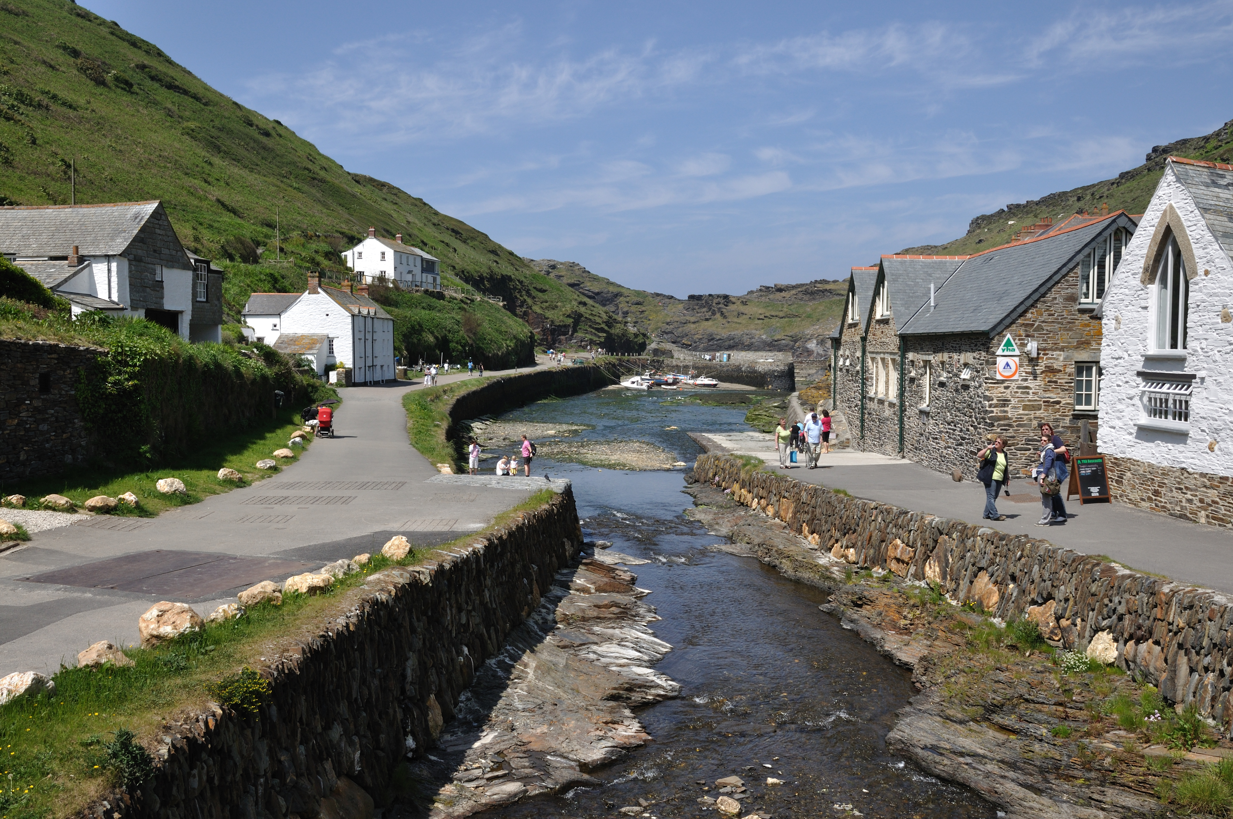 In Boscastle